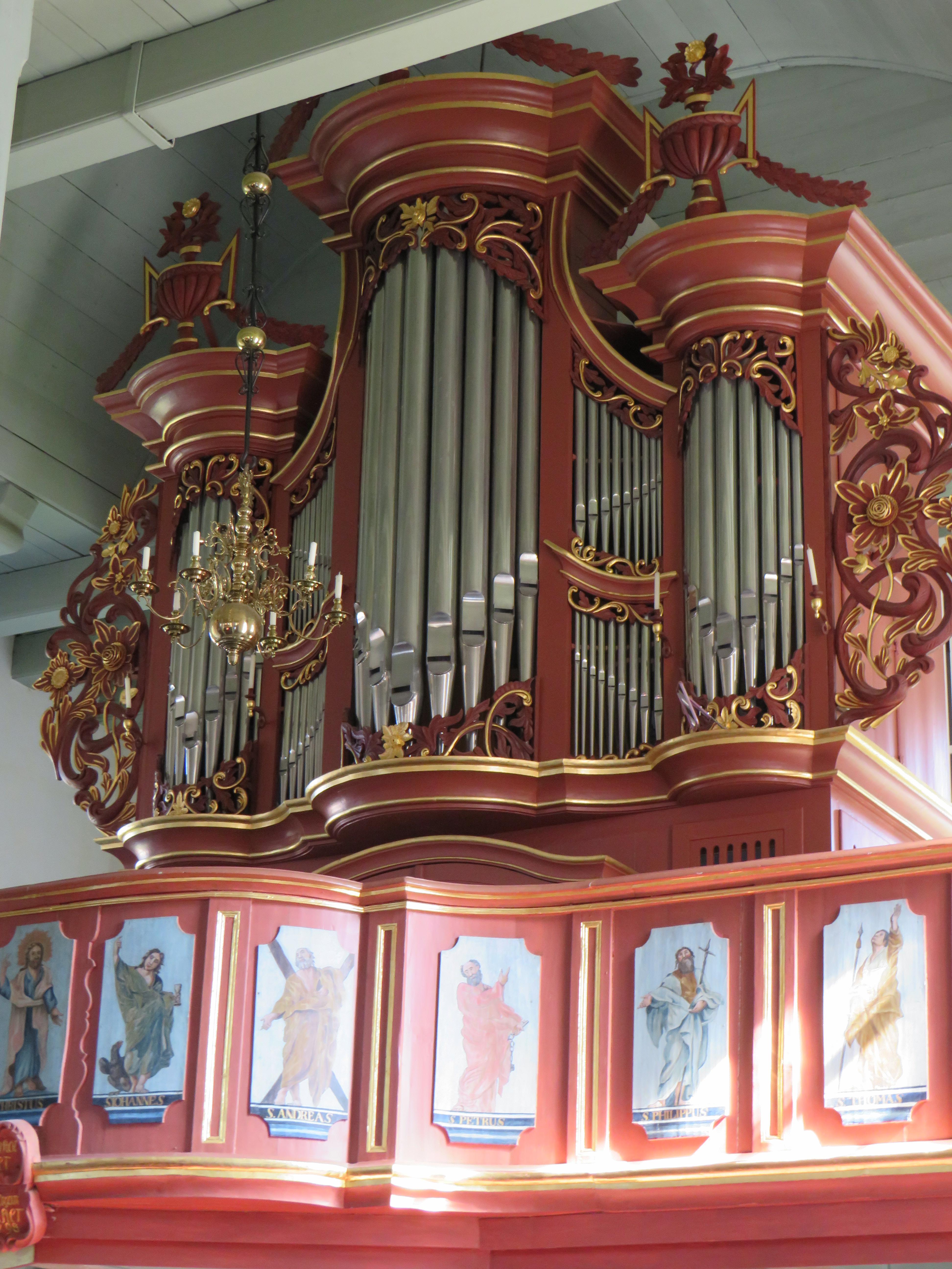 Barbara-Kirche (Strackholt) Orgel 3